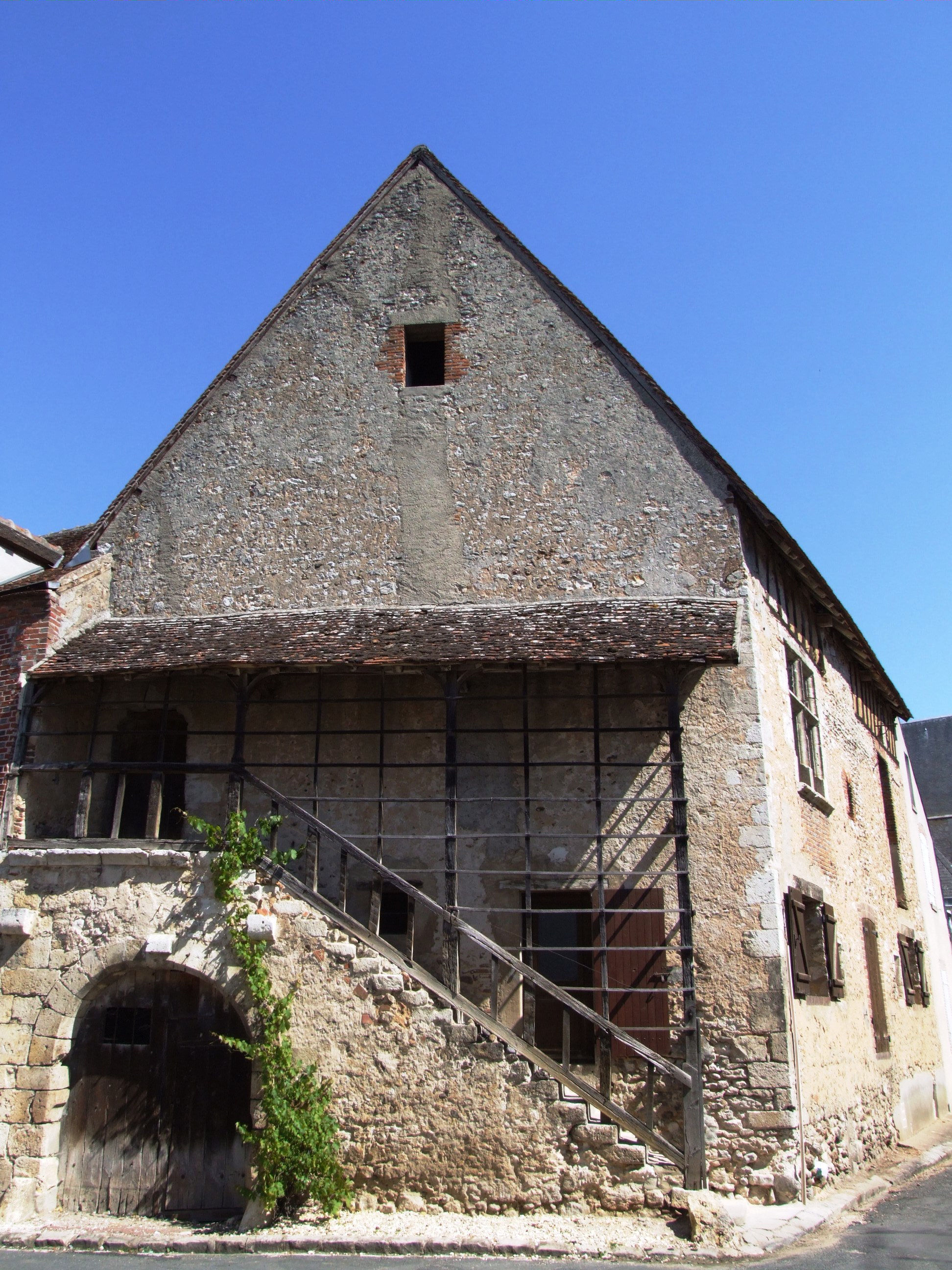 Châtillon-Coligny - Maison dite le Grenier à Sel, rue Belle Croix (prolongement de la rue de la Poterne).